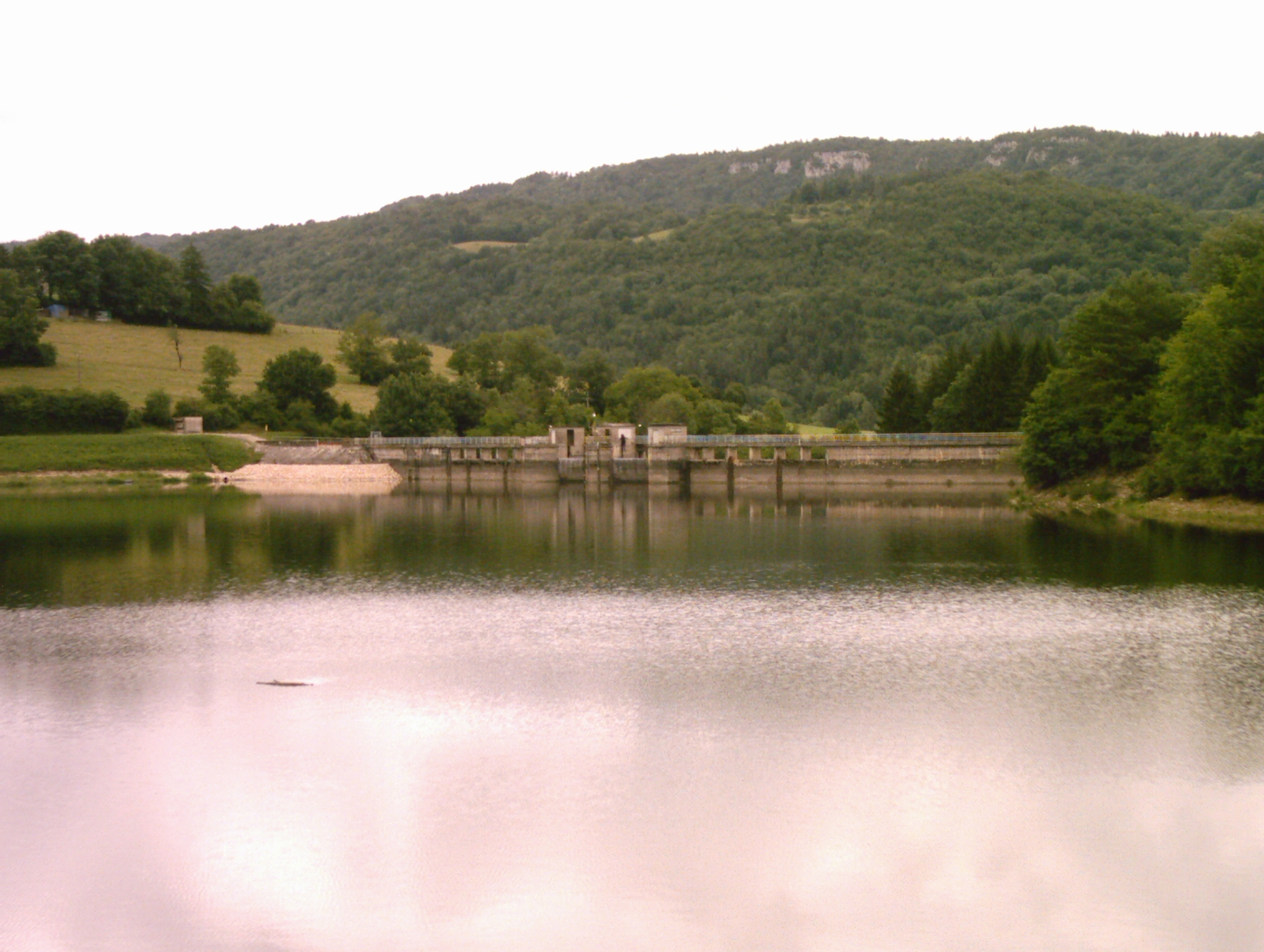 Le barrage à Matafelon (Ain, FRANCE)